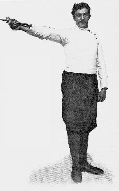 Henri Masson, médaille d'argent au fleuret aux JO de Paris 1900.